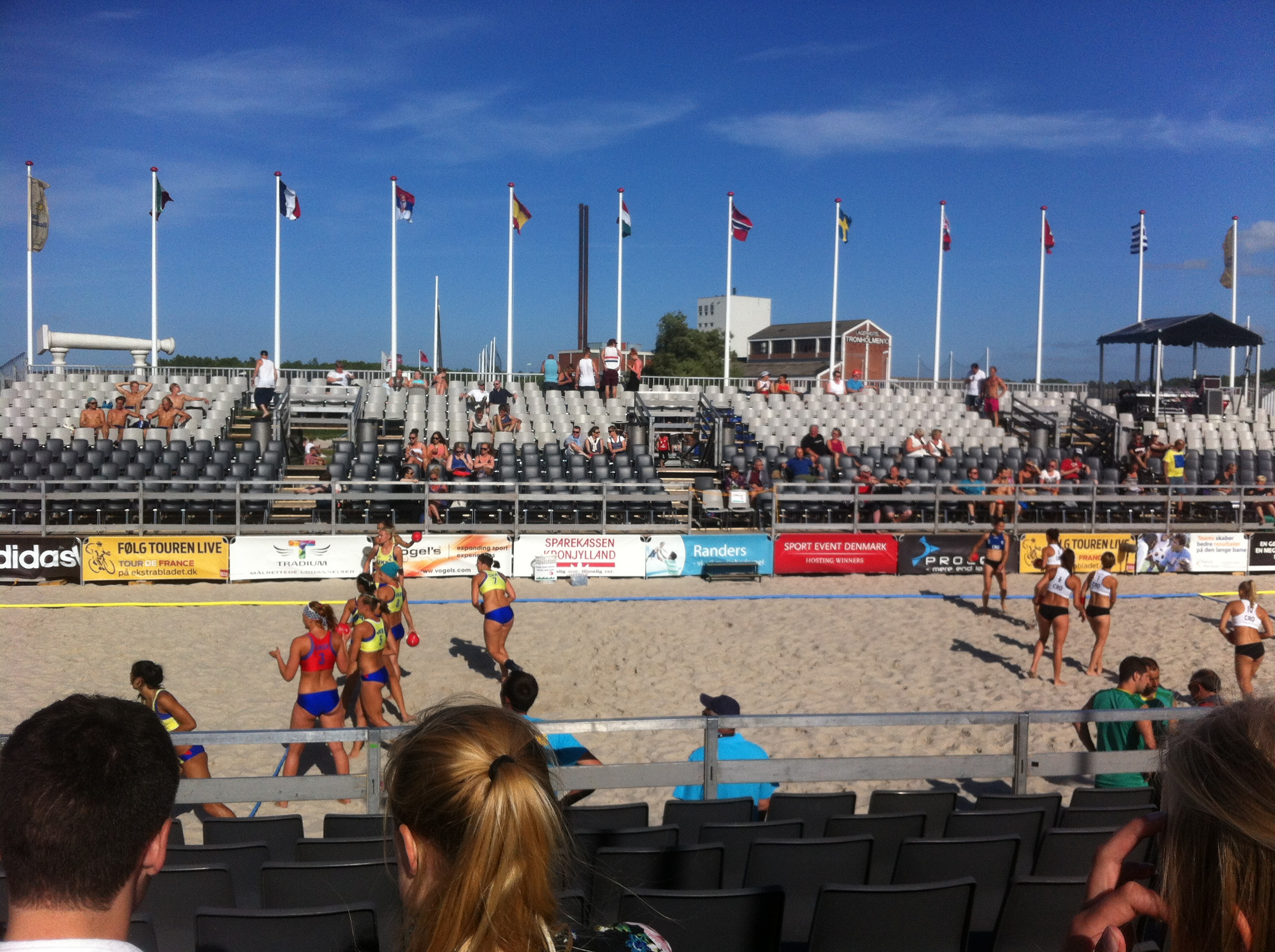 International strandhåndbold-turnering på Tronholmen i Randers. 2013